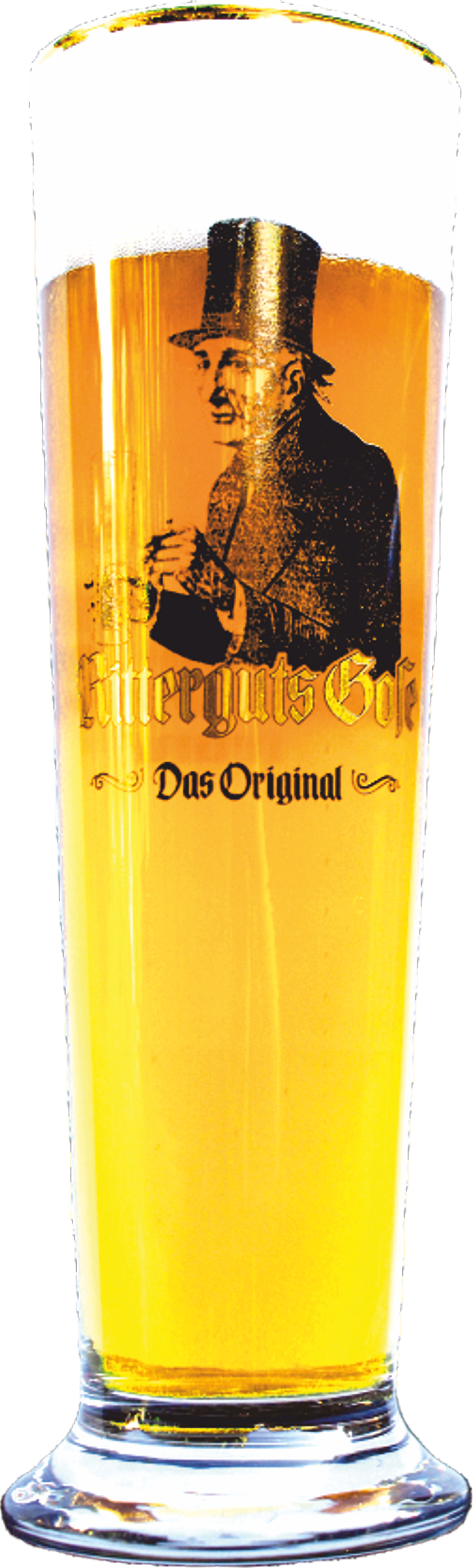 Ritterguts Gose Glas